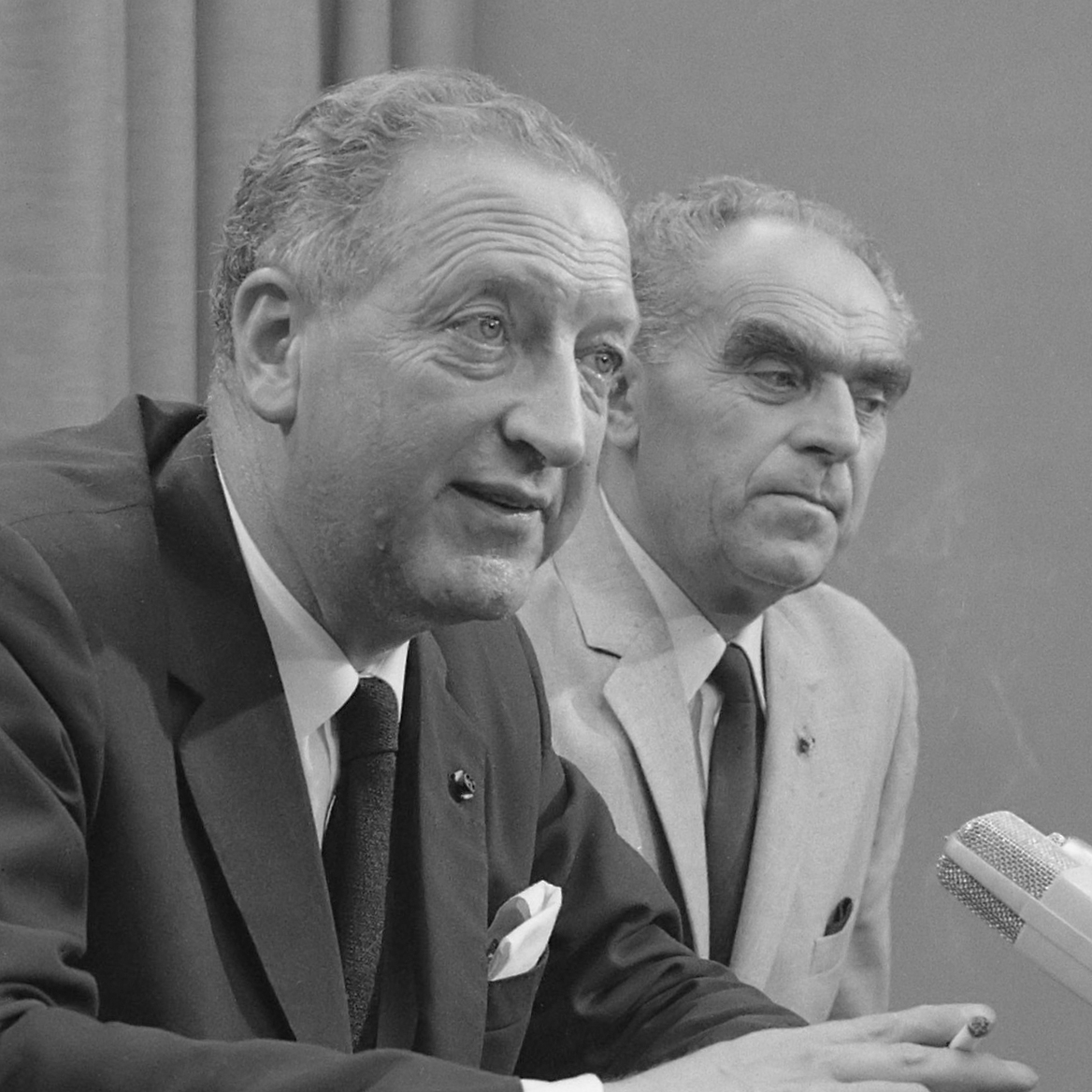 Fokkerdirecteur Diepen terug uit Indonesie op Schiphol, rechts H. During (financier directie Fokker) 23 augustus 1965